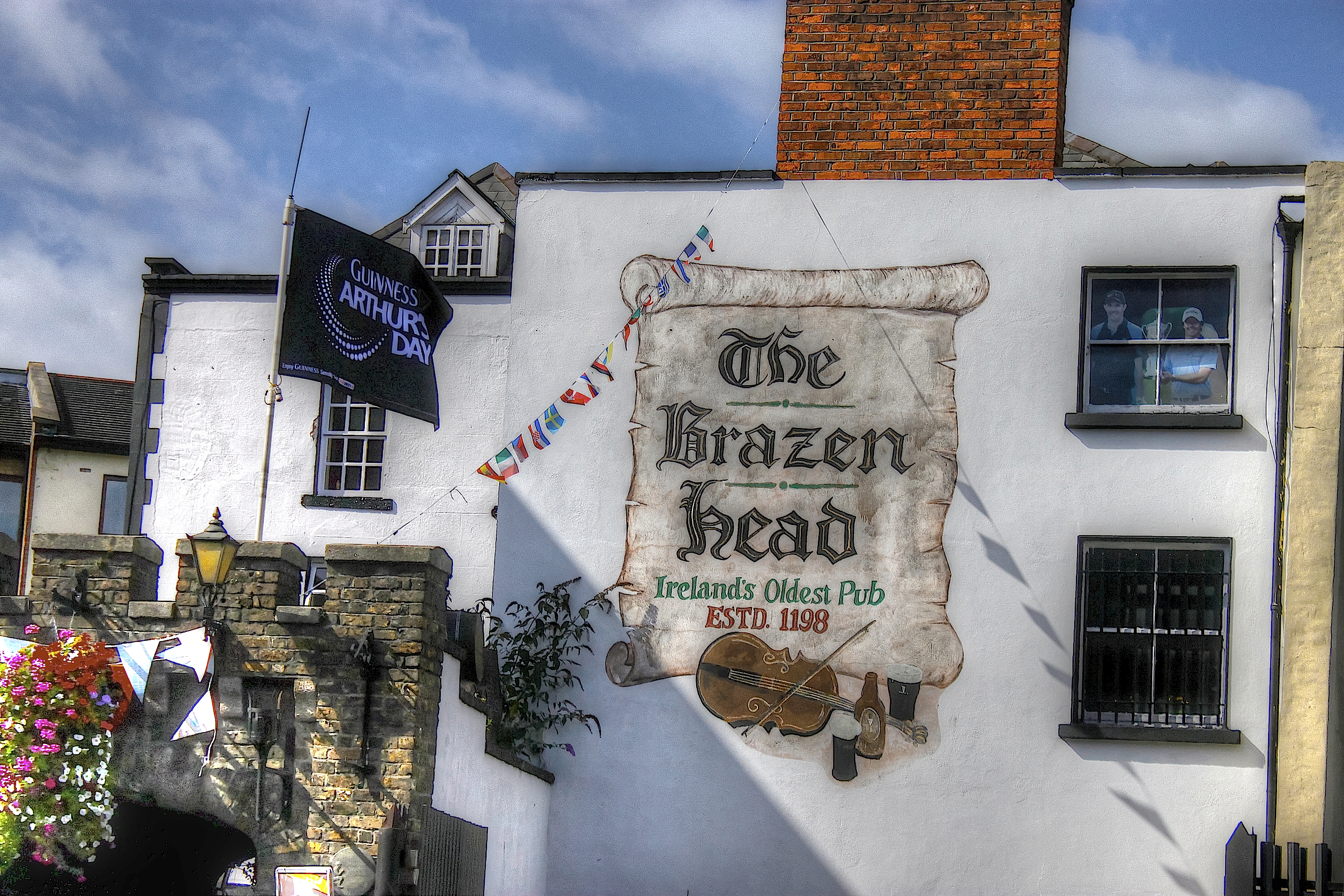 brazen head1